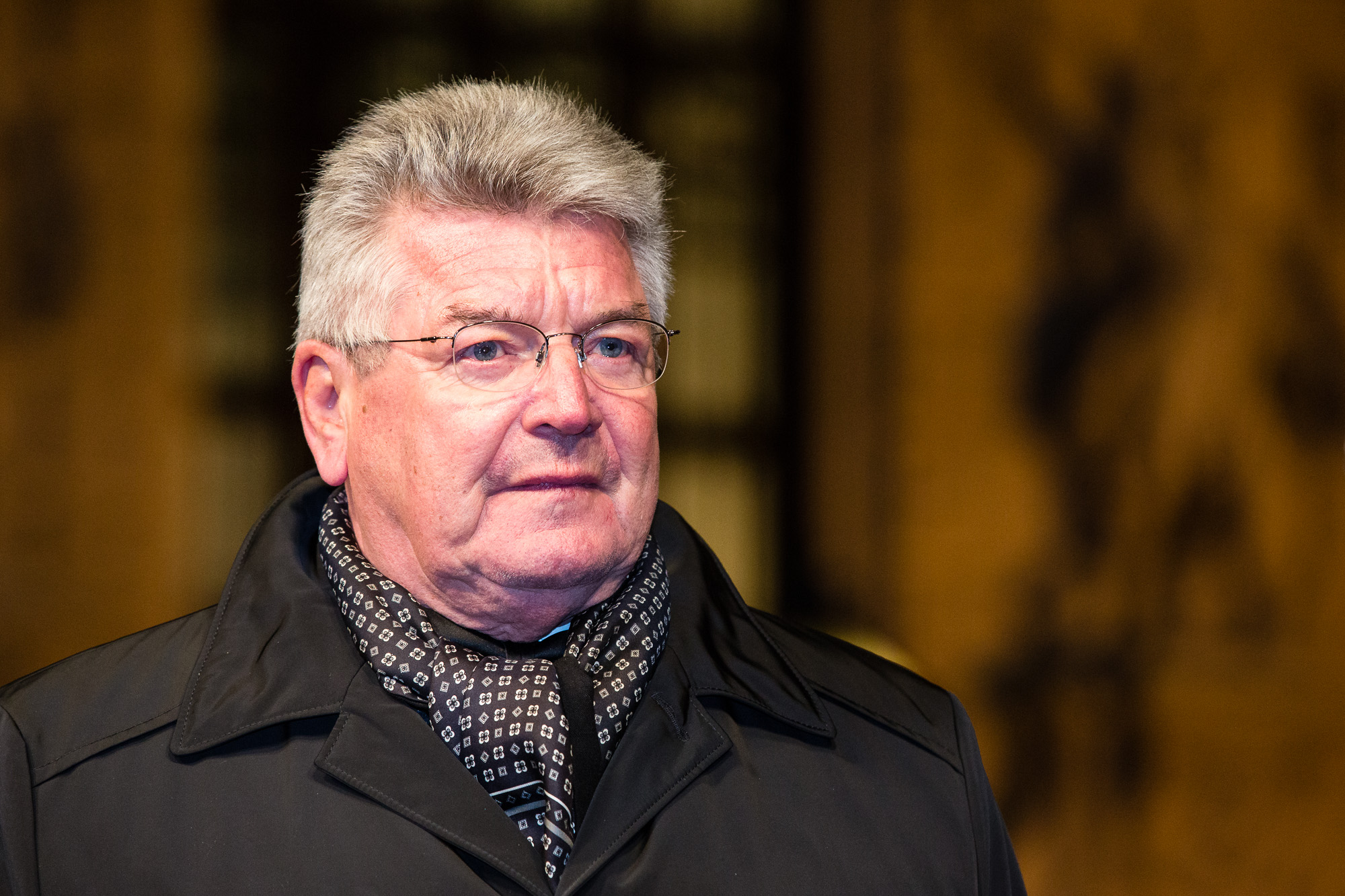 Franz Wurz im Interview bei der Publikumsveranstaltung "ÖAMTC Welt des Motorsports" Begleitend zu FIA Gala in der Wiener Hofburg am Freitag, 2. Dezember am Wiener Heldenplatz